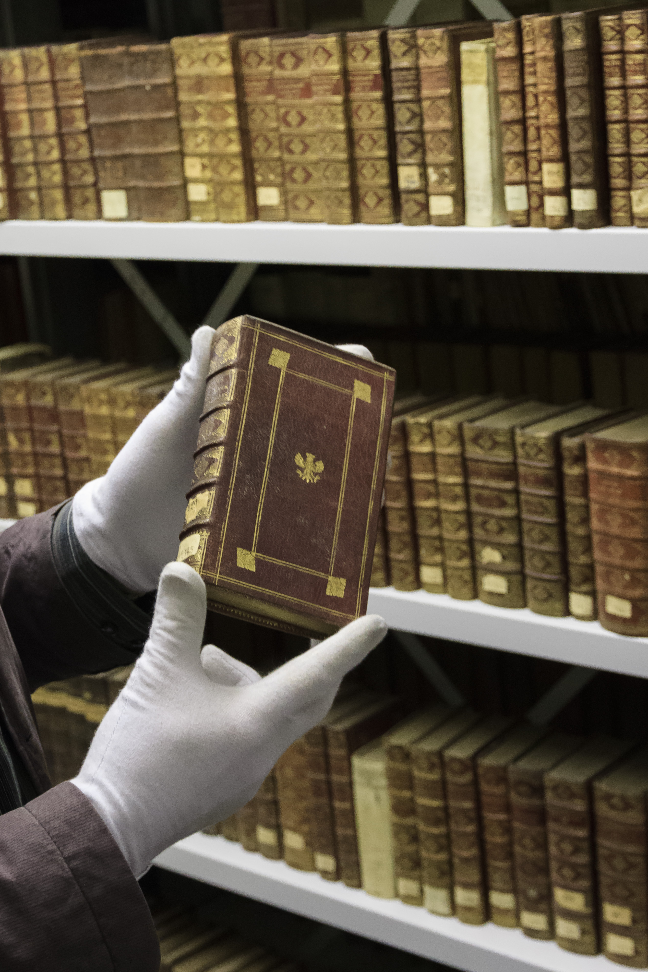 Bestände der Bibliothek des ersten preußischen Regierungspräsidenten Christoph Friedrich von Derschau. Zu sehen ist ein Buch aus der ehemaligen Bibliothek der Grafen und Fürsten von Ostfriesland.